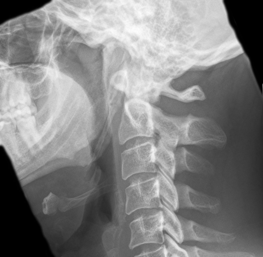 Langer Processus styloideus bzw. ossifiziertes Lig. stylohyoideum mit Ausbildung einer gelenkartigen Formation.